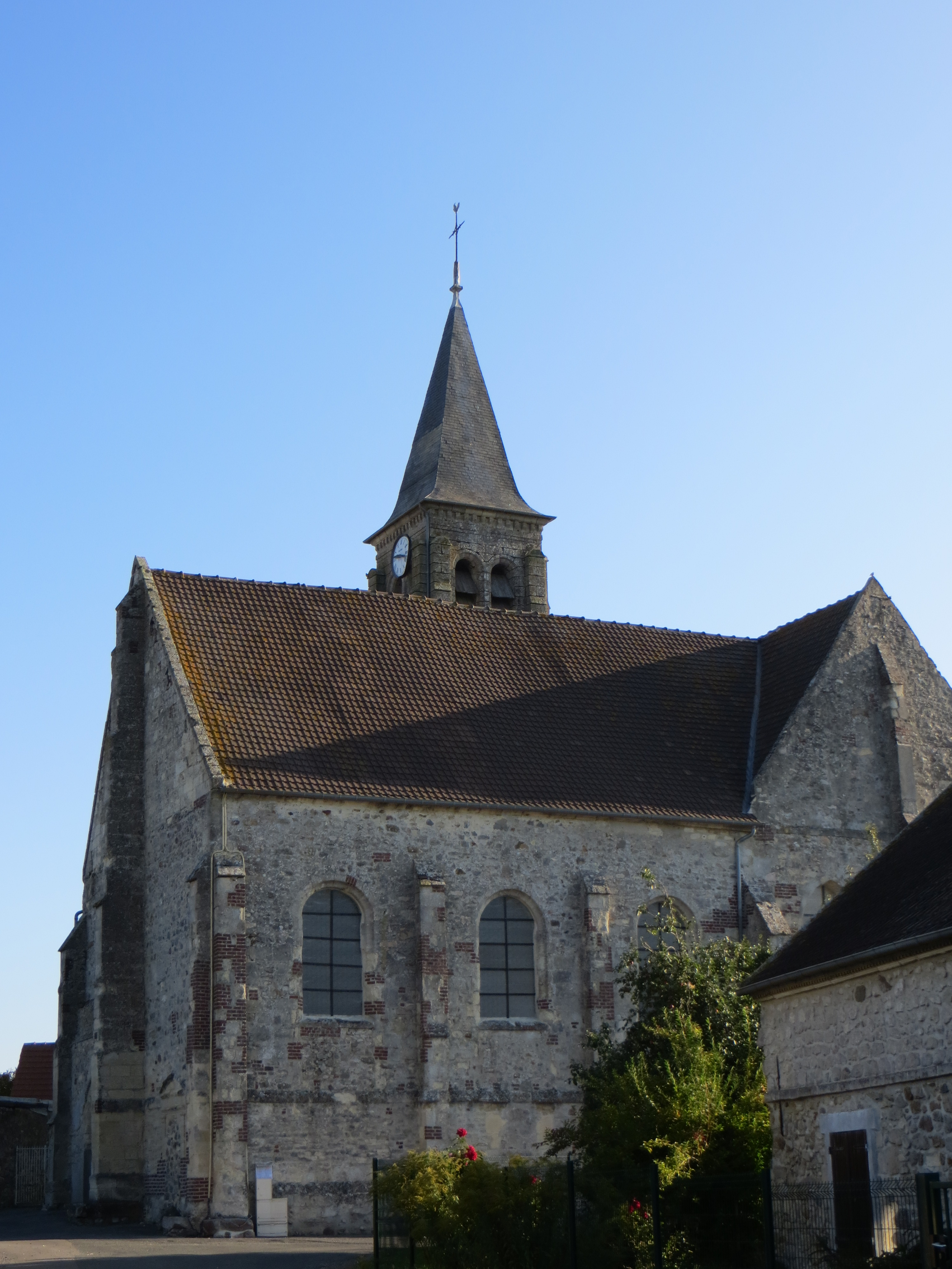 Vue générale de l'église